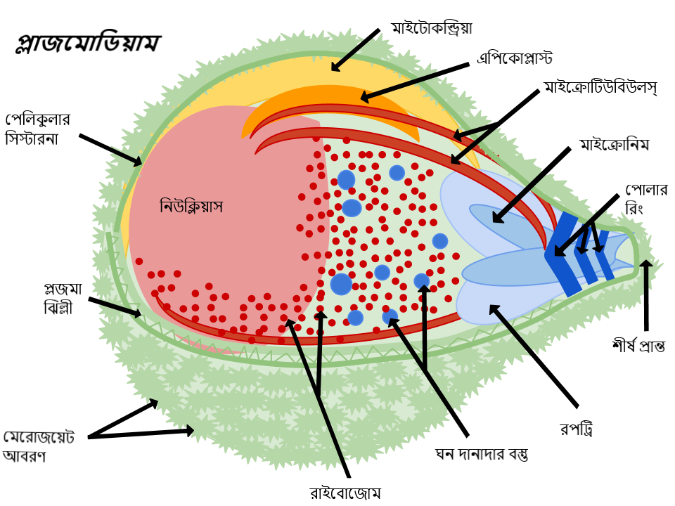 প্রোটিস্ট হিসেবে প্লাজমোডিয়াম এপিকমপ্লেক্সা পর্বের একটি ইউক্যারিওট। সাধারণ ইউক্যারিওট থেকে আলাদা ও অস্বাভাবিক যেসব বৈশিষ্ট্য এদের রয়েছে সেগুলো হলঃ শীর্ষ প্রান্তের কাছে অবস্থিত রপট্রি, মাইক্রোনিম এবং পোলার রিং। প্লাজমোডিয়াম সবচেয়ে বেশী পরিচিত এর সৃষ্ট ম্যালেরিয়া রোগের কারণে।